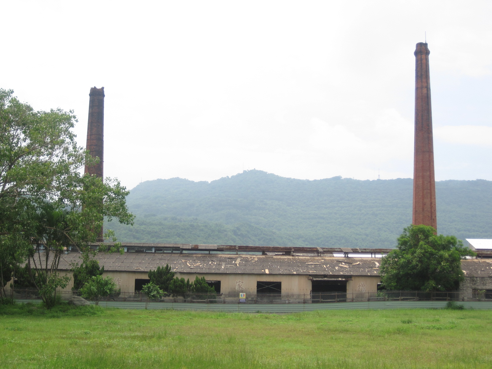 中都唐榮磚窯廠側面，可看到兩根煙囪。